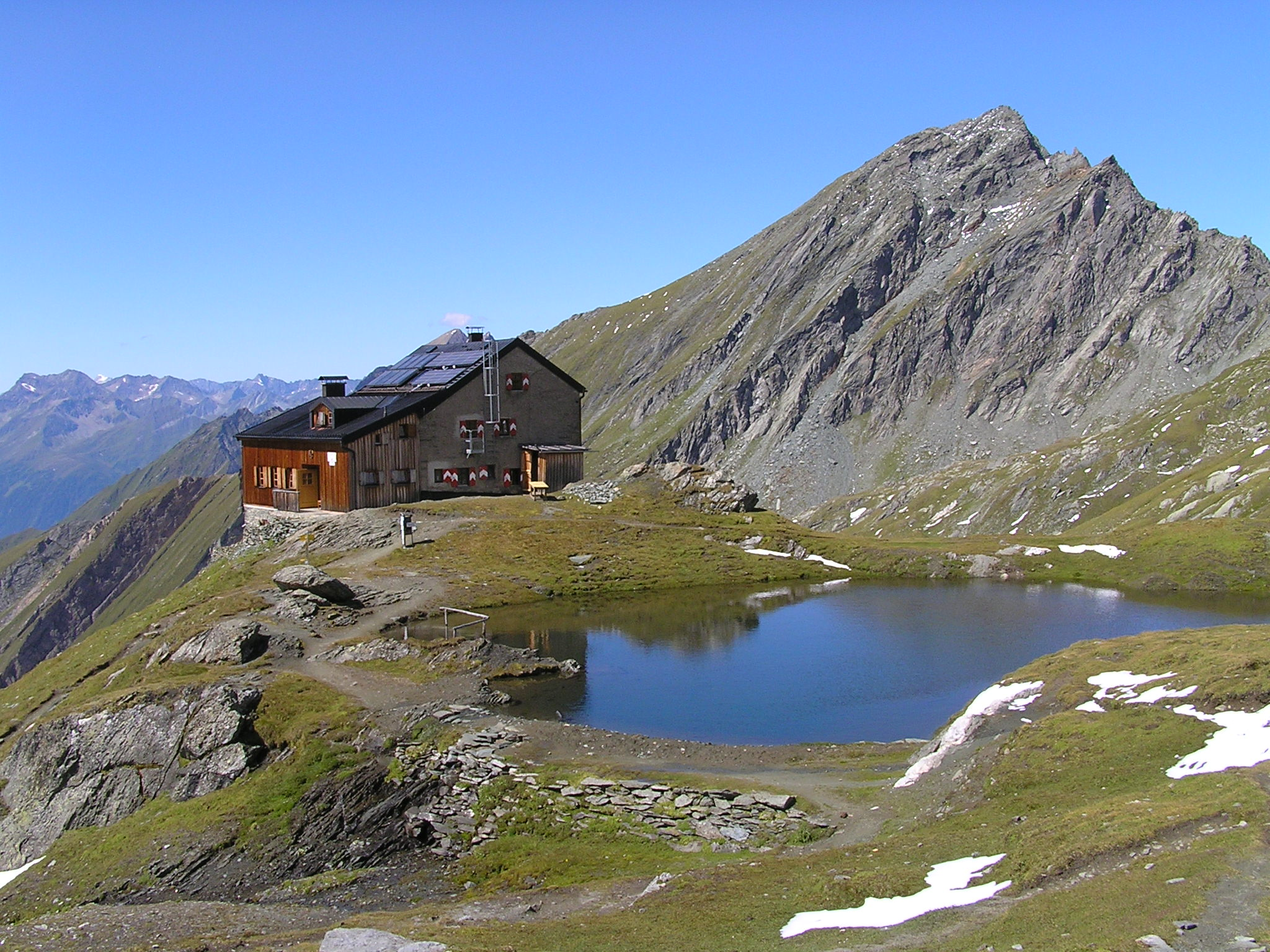 Die Sudetendeutsche Hütte mit dem Nussingkogel im Hintergrund